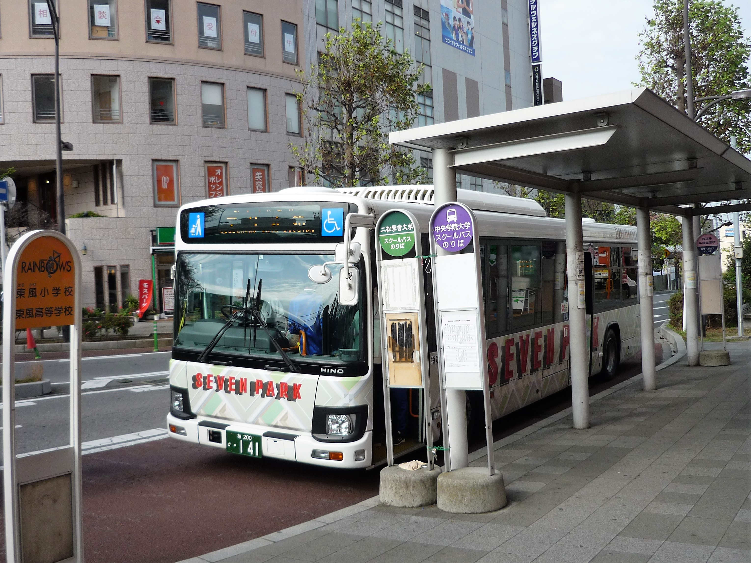 我孫子駅北口に停車中のセブンパーク アリオ柏行き無料バス Panasonic Lumix DMC-FS3